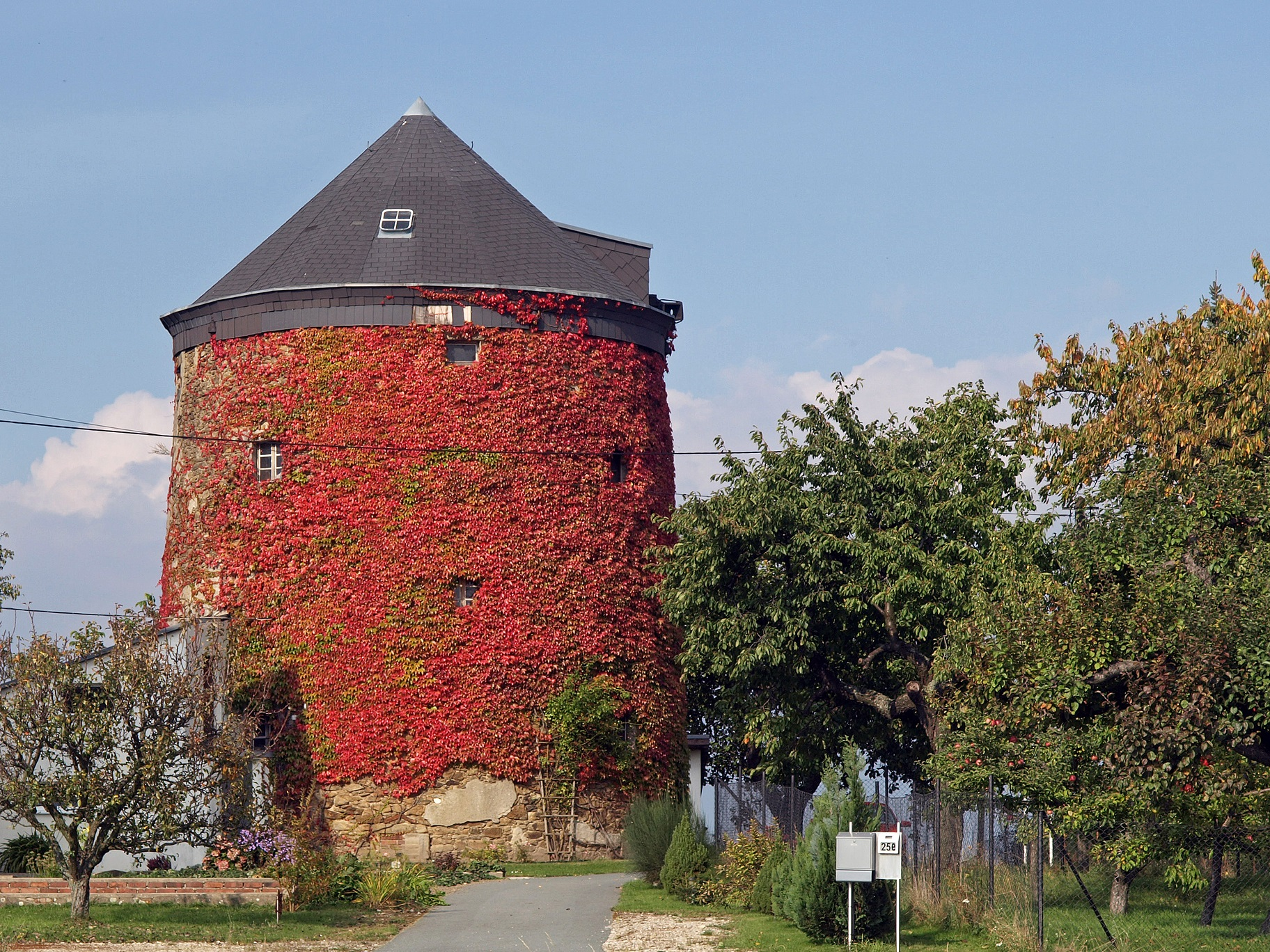 Holländerwindmühle in Pommritz (Hochkirch)